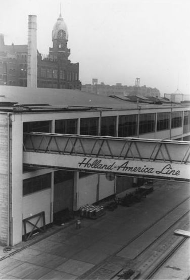 Bâtiment et passerelle du Cruise Terminal Rotterdam en 1949.